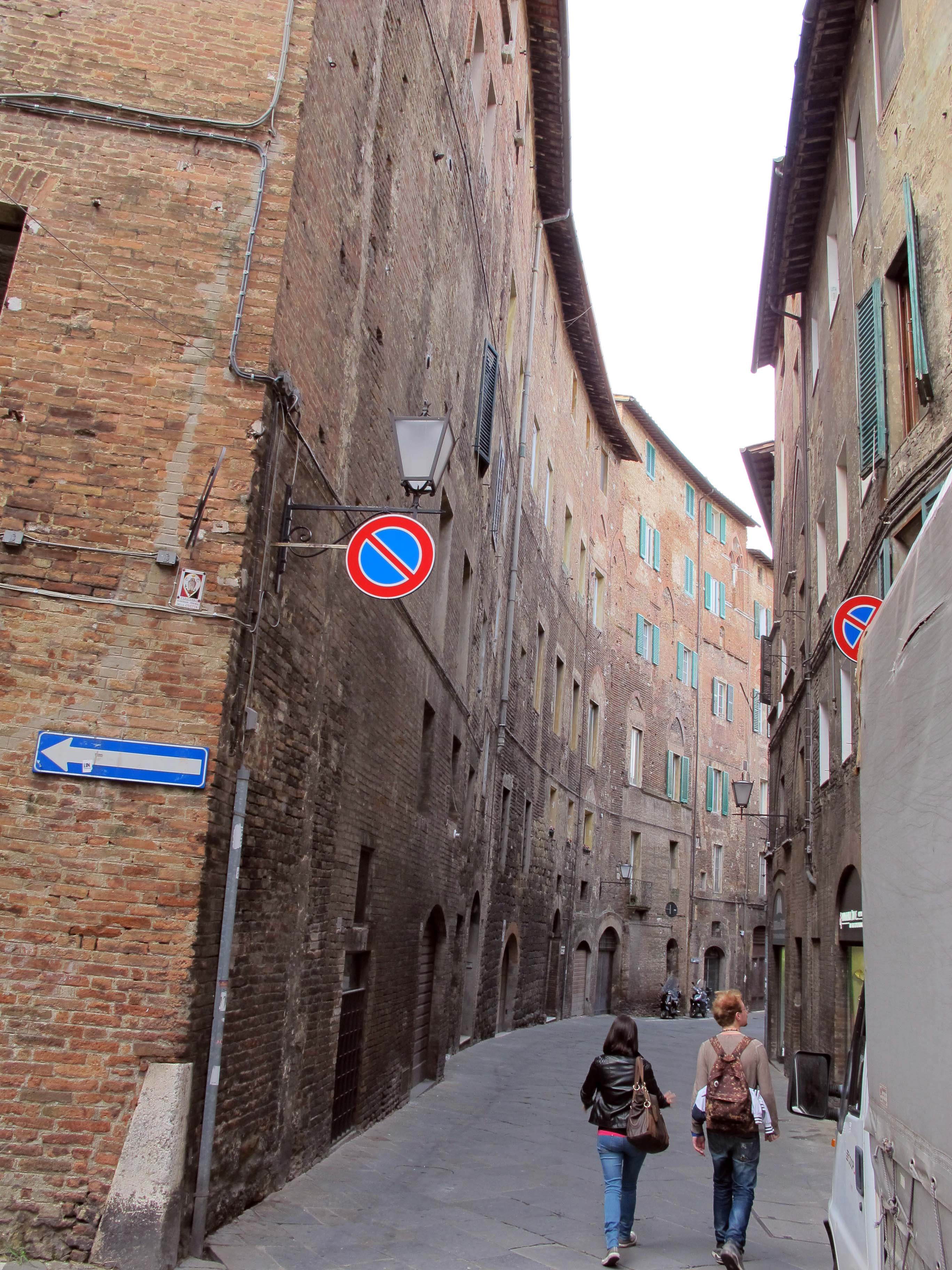 Siena